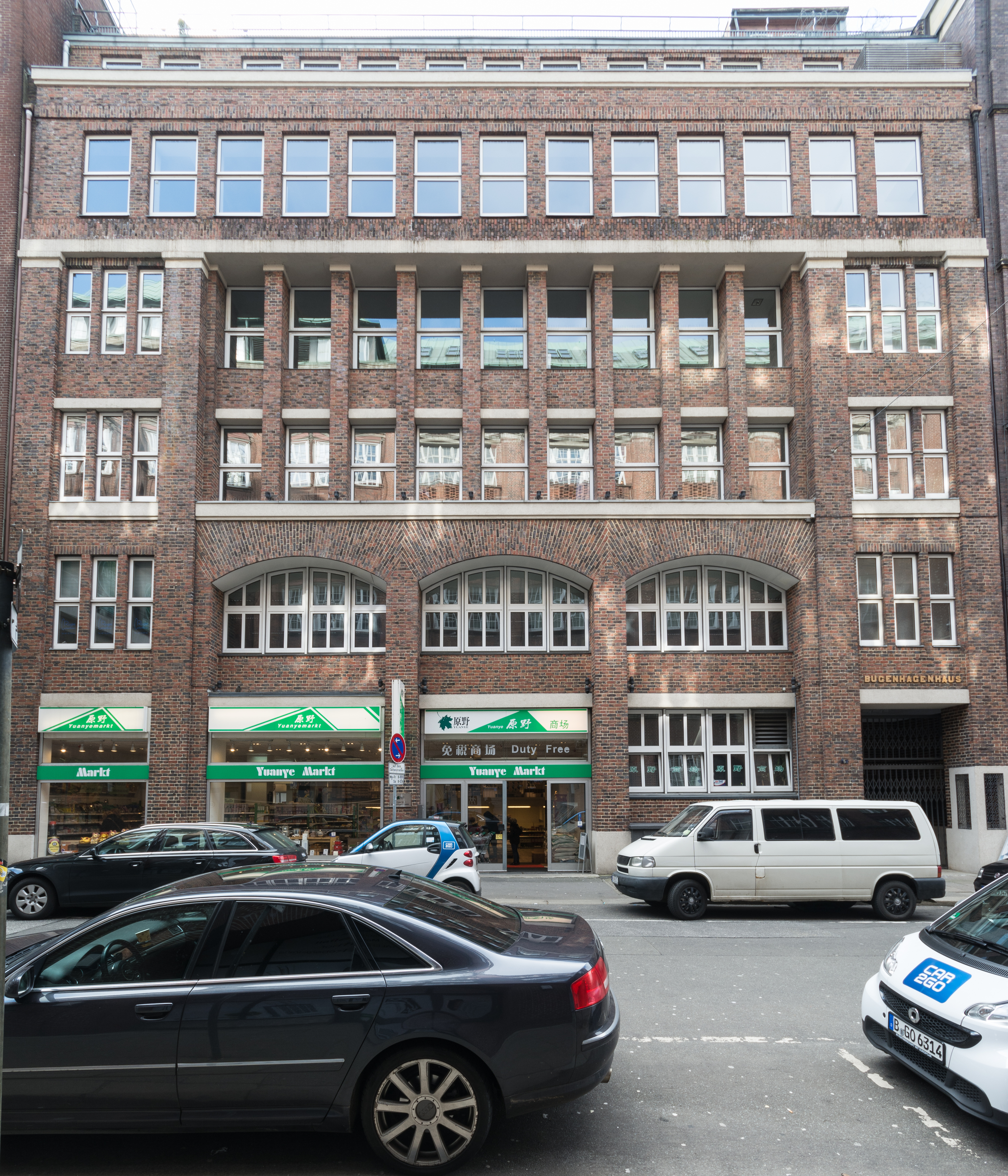 Kontorhaus Bugenhagenhaus in Hamburg-Altstadt. This is a photograph of an architectural monument.